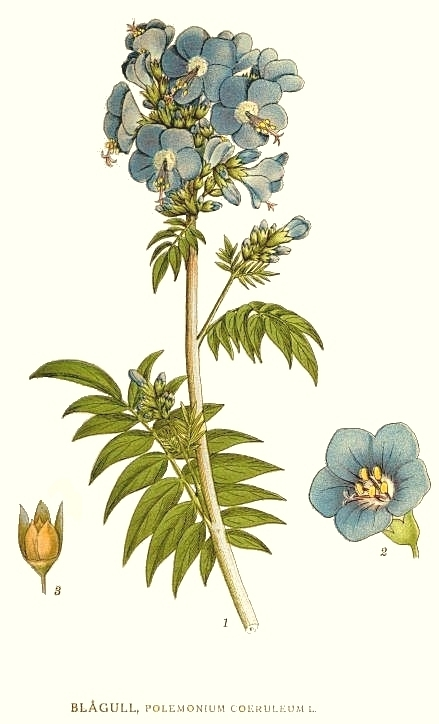 Polemonium caeruleum L. Original Description Blågull, Polemonium coeruleum L.